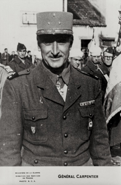 Le général Marcel Carpentier (1895-1977) commandant de la 2e division d'infanterie marocaine (2e DIM)